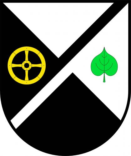 znak, Obytce, okres Klatovy. "Stříbrno-černě kosmo dělený štít se šikmým černo-stříbrně děleným břevnem. Vpravo zlaté vozové kolo se čtyřmi rameny, vlevo vztyčený zelený lipový list."